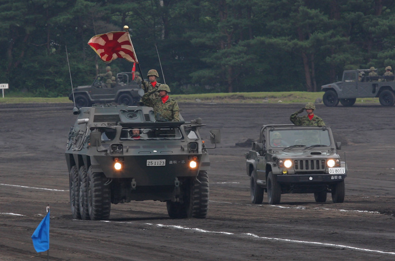 普通科教導連隊本部管理中隊の82式指揮通信車。創立記念行事にて。